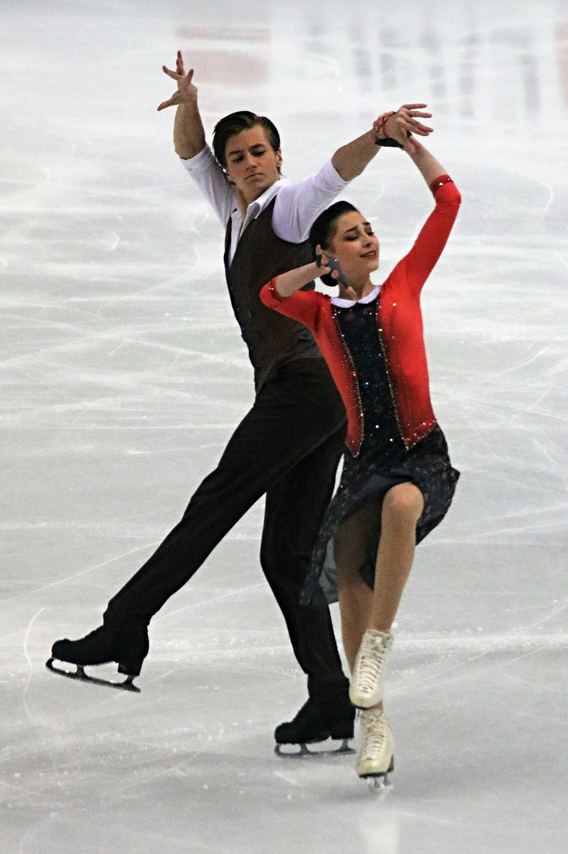 Елизавета Шанаева и Девид Нарижный (Россия) на финале Гран-при среди юниоров 2019-2020